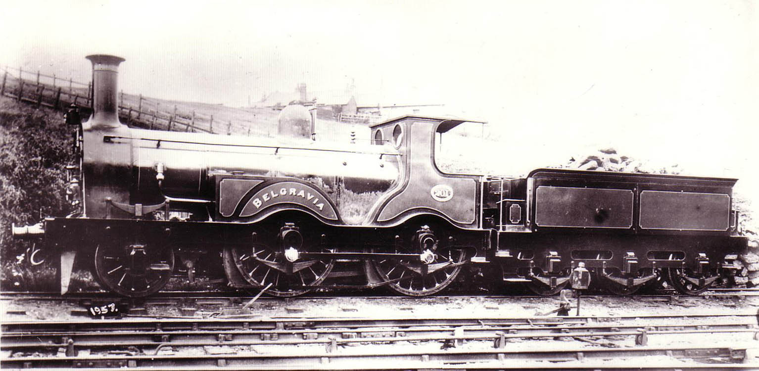 LB&SCR Belgravia class